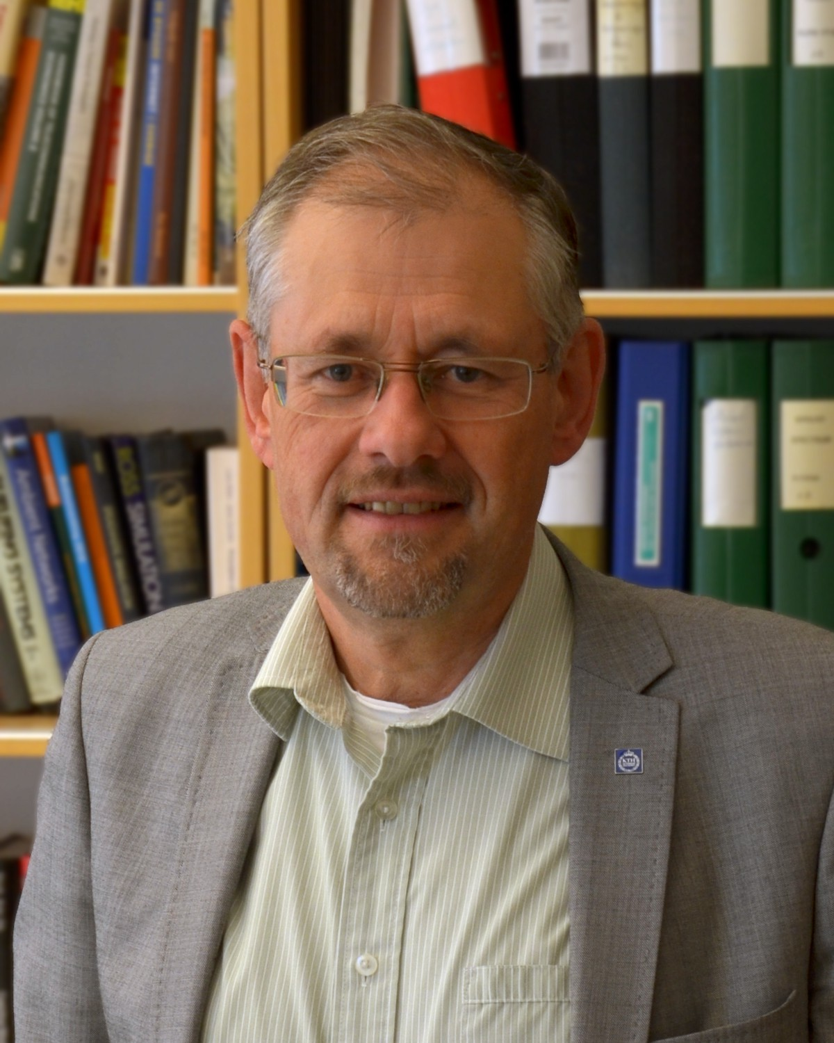 Professor Jens Zander på KTH.